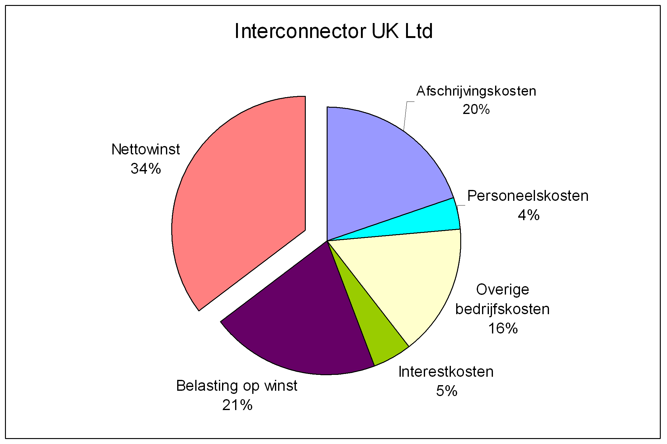 Interconnector Uk Ltd. Overzicht van de kosten en winst van het bedrijf in boekjaar 2008/09.